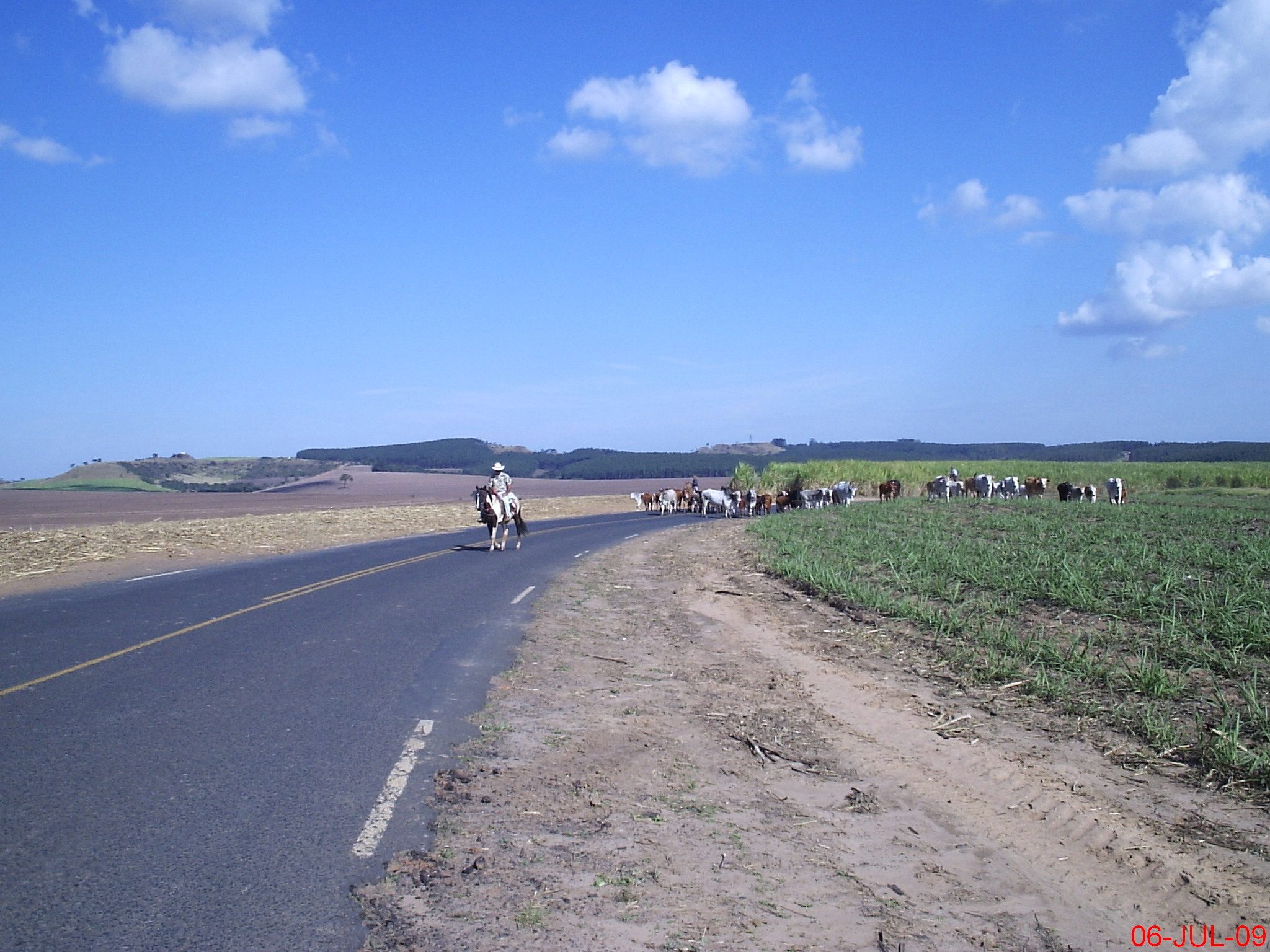 Comitiva de Boiadeiros na Serra de Itaqueri